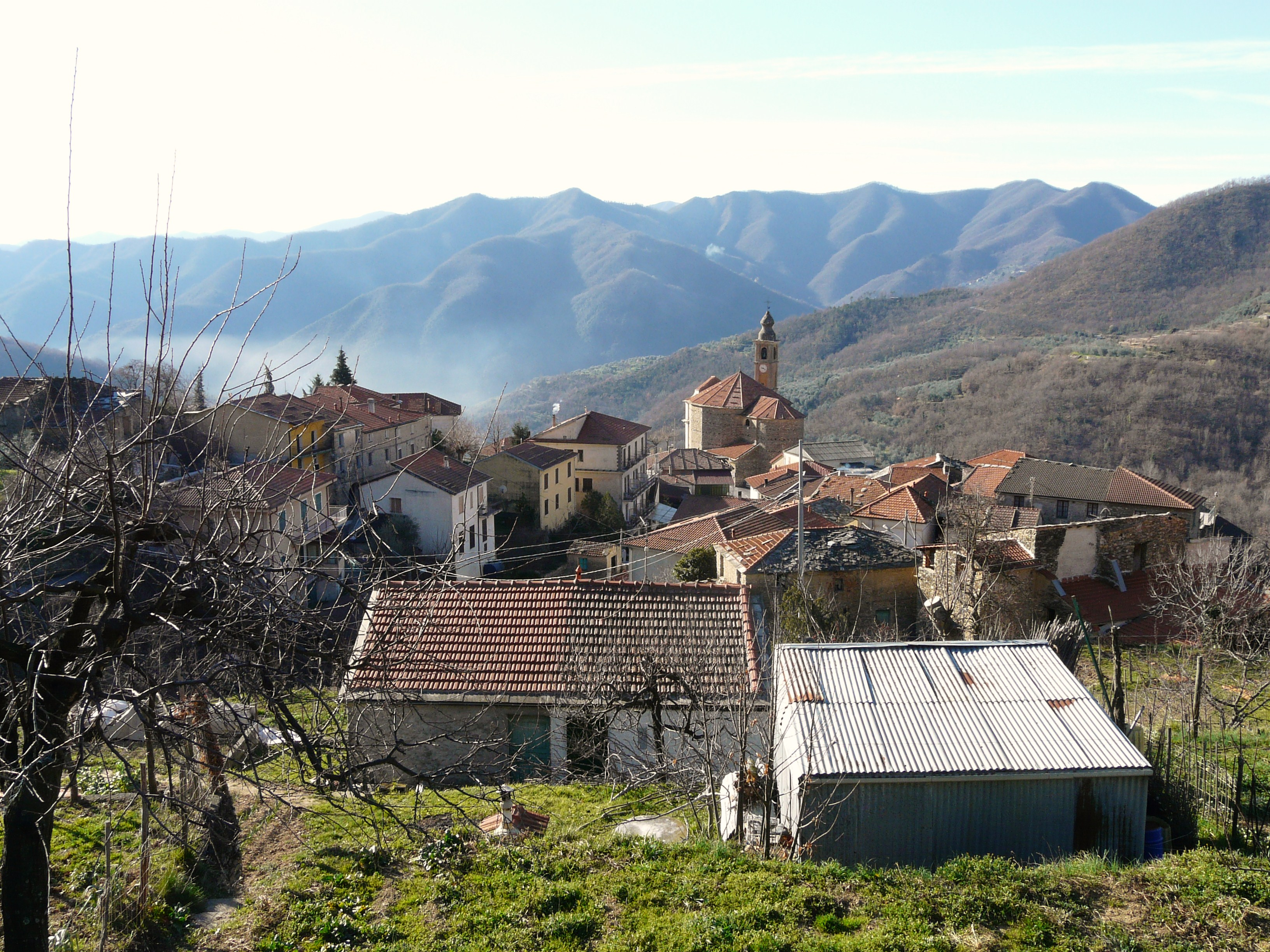 Aquila d'Arroscia, Liguria, Italia